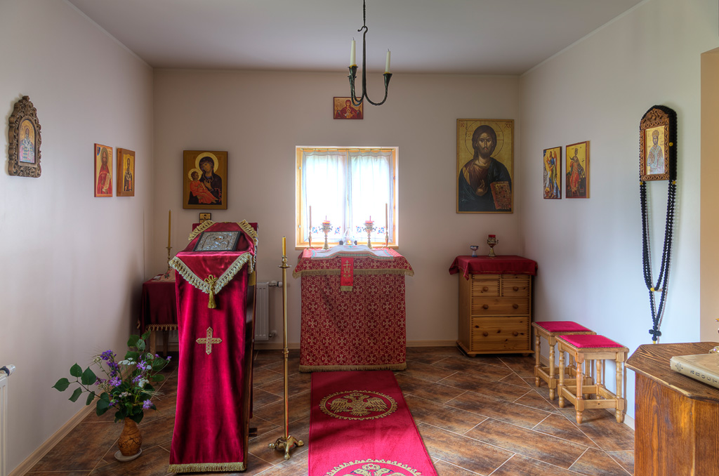 Püha Eelkäija Skiita kloostri kabelivaade